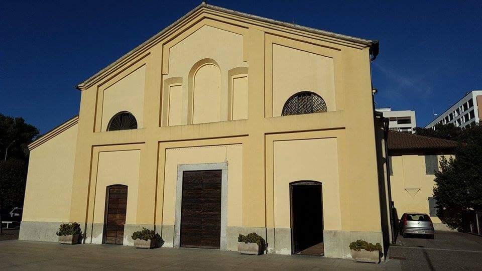 Trezzano Sul Naviglio - Chiesa di Sant' Ambrogio Trezzano Sul Naviglio - Chiesa di Sant' Ambrogio